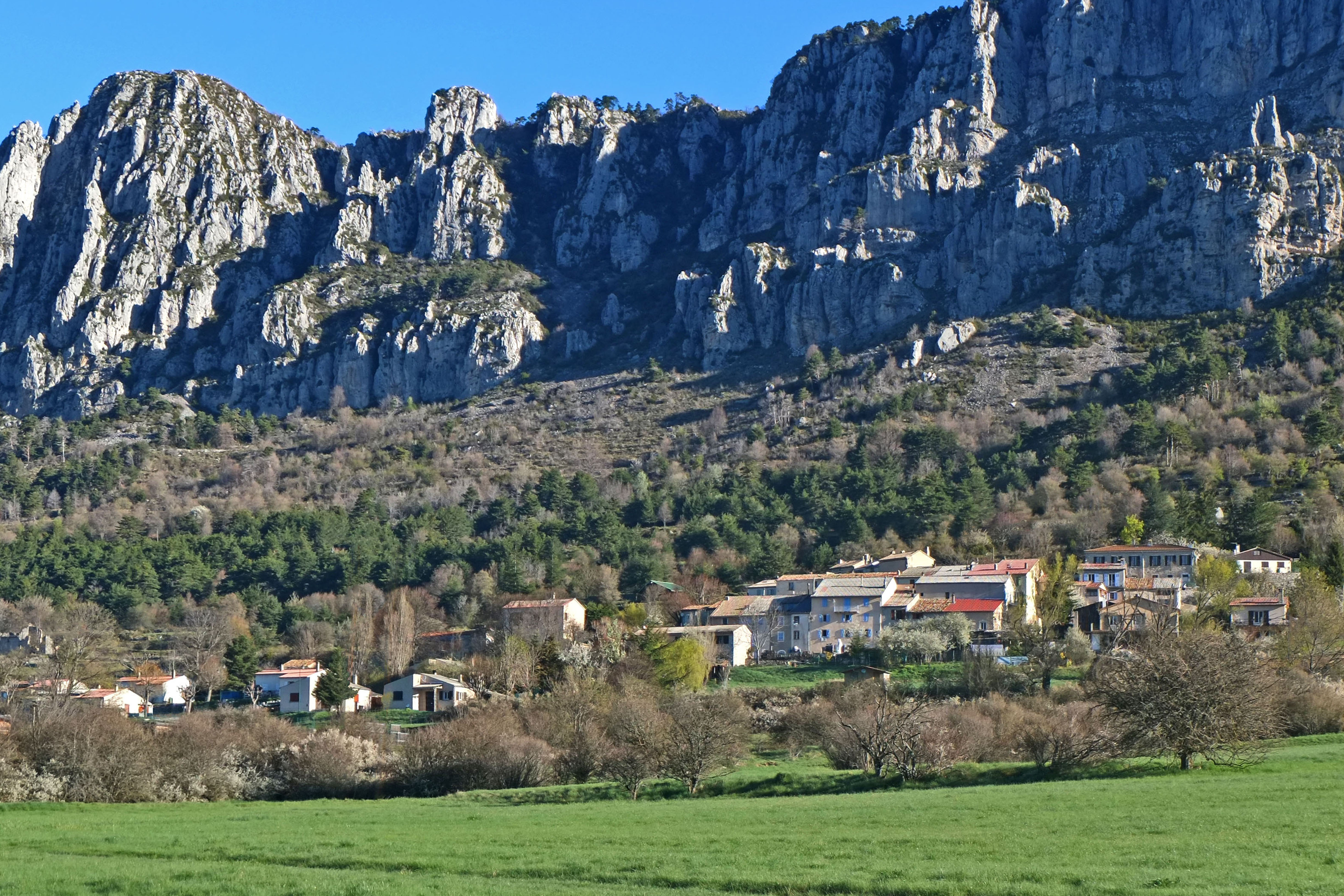 Vue sur le village de Séranon depuis la route Napoléon